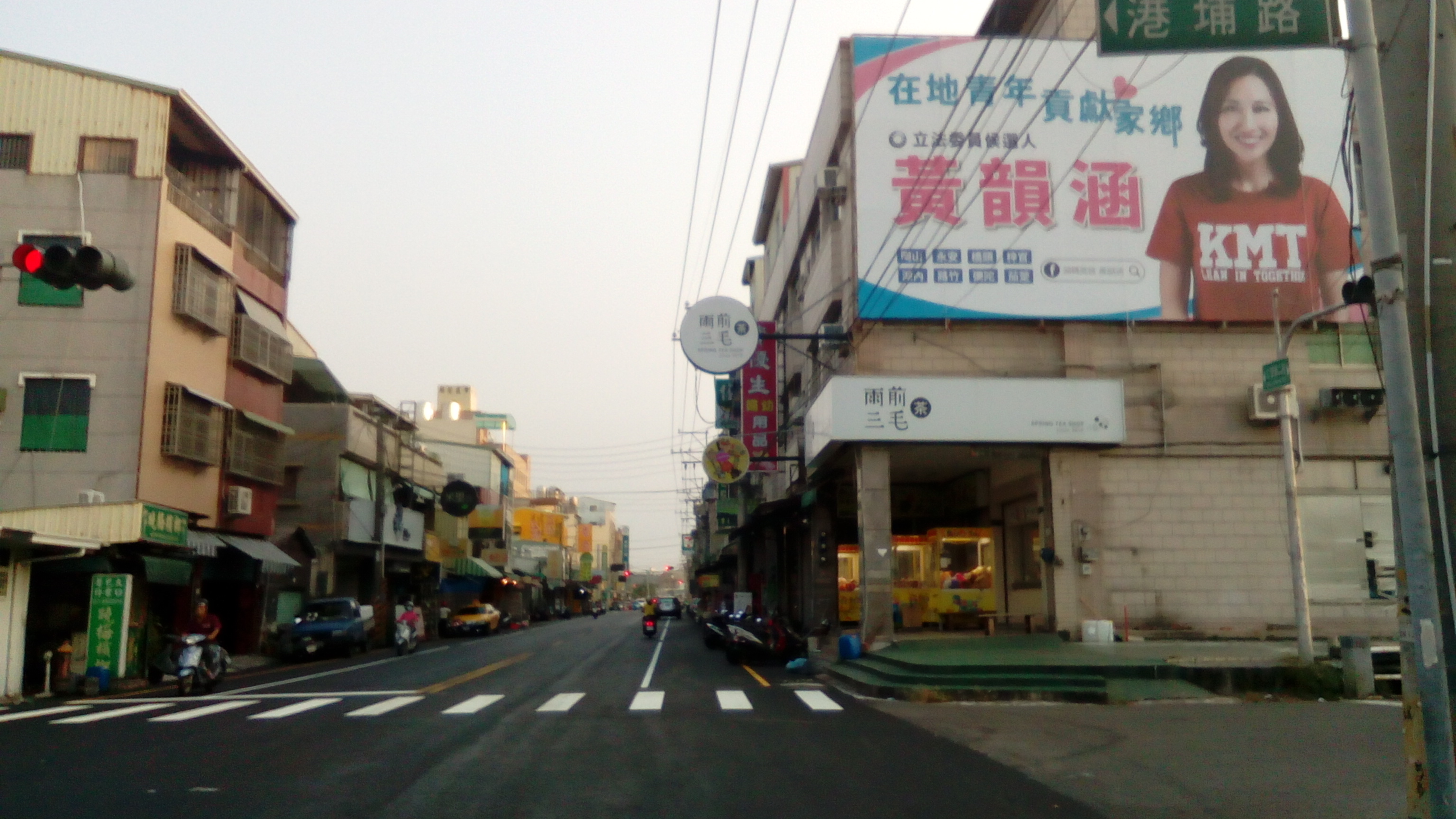 即市中心